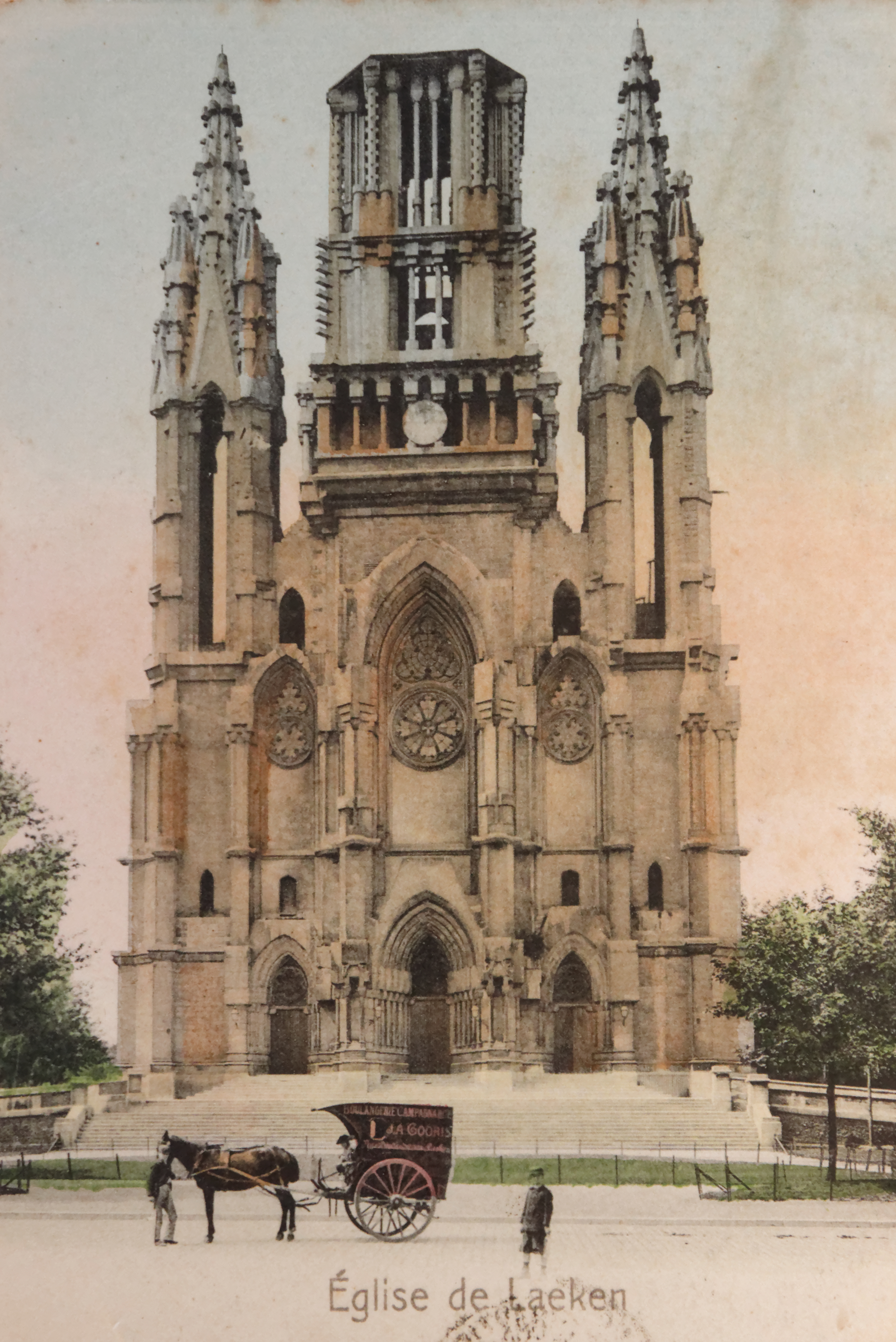 'église Notre-Dame de Laeken vers 1900